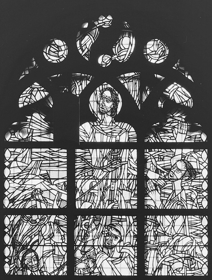 Hervormde Nicolaïkerk Of Klaaskerk: Interieur, aanzicht gebrandschilderd glas-in-loodraam van Piet Kok (opmerking: Gefotografeerd voor Glas in lood in Nederland 1817-1968). Gemaakt door Piet Kok, ter ere van Johan Brouwer.